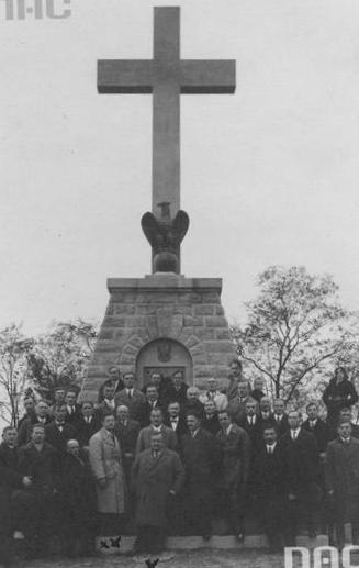 Pomnik legionistów polskich, poległych w bitwie pod Laskami w 1914, ustanowiony w Żytkowicach. Przed monumentem widoczni Członkowie Związku Legionistów: prezes komitetu budowy pomnika, starosta kazimierski Czesław Kowalski (x), i zastępca prezesa komitetu, naczelny dyrektor Państwowej Wytwórni Prochu Jan Prot (xx).